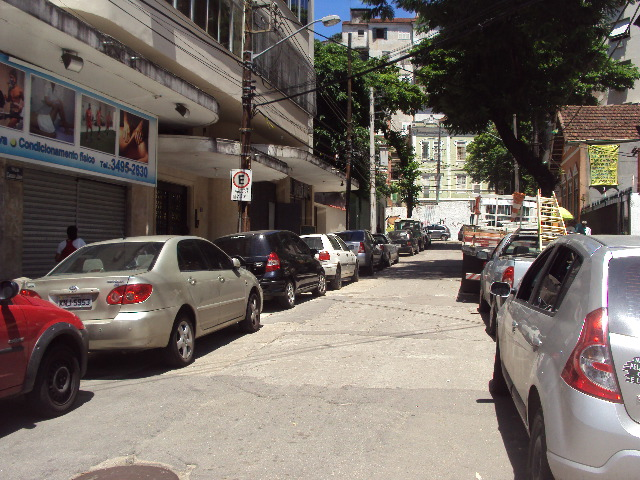 Vista da Rua Cardoso Júnior (uma rua sem saída), bairro Laranjeiras, Rio de Jnaeiro-RJ, Brasil.